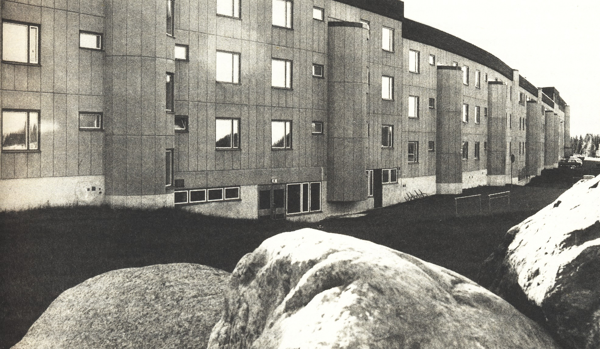 "Ormen långe" bostadsområde i Svappavaara